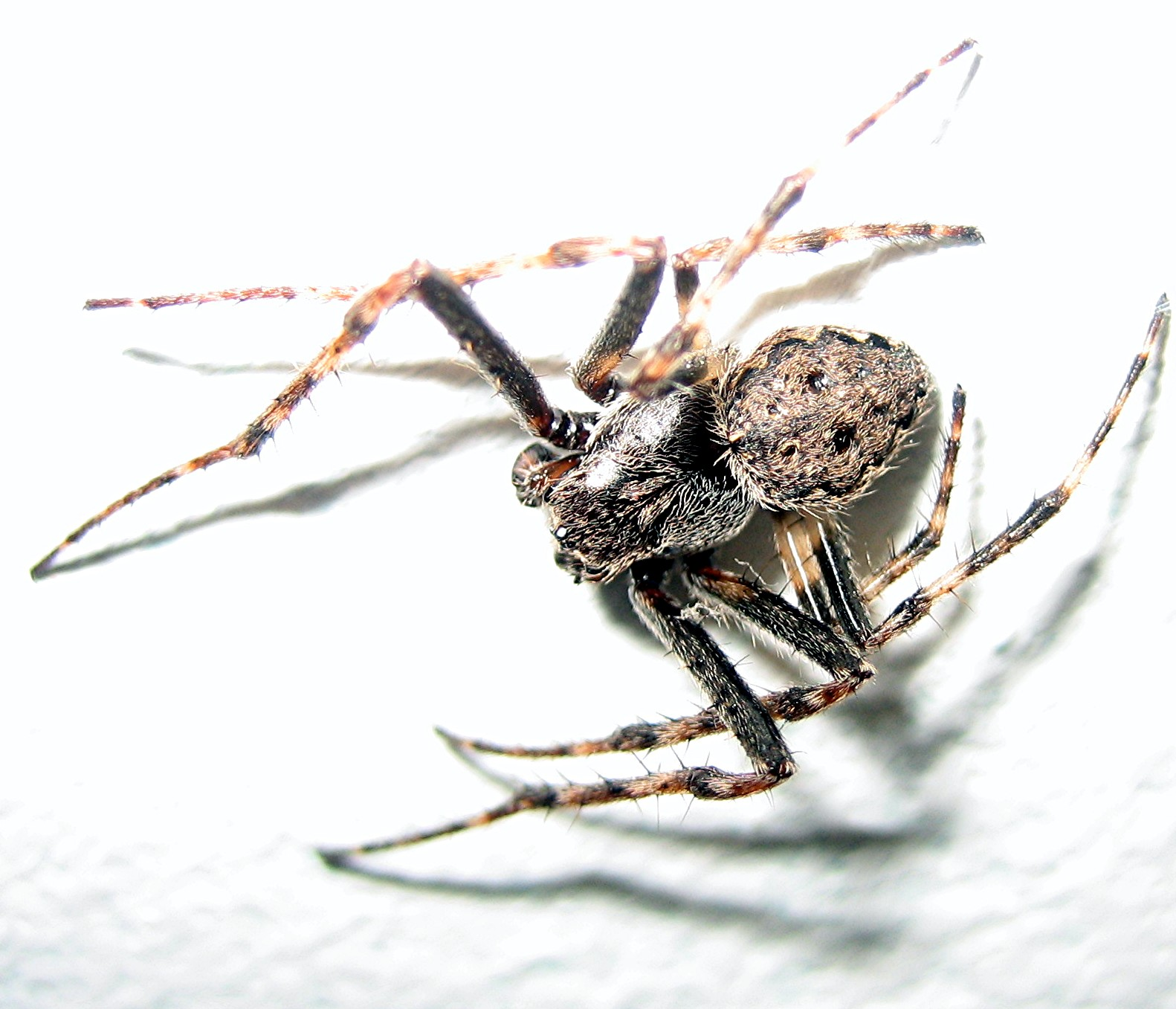 Eine wildlebende Spinne zu Gast im Haus - Foto wurde mit einem Fotostudio bearbeitet. Das Licht, der Kontrast und die Bildschärfe wurde partiell nachgebessert. Autor(en): Viktoria Erfurt